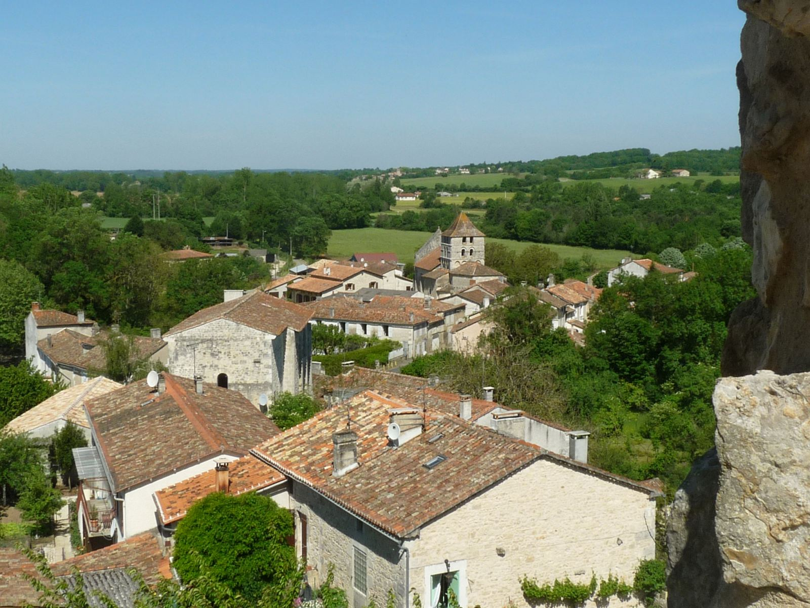 Vue du donjon de Marthon, Charente, France